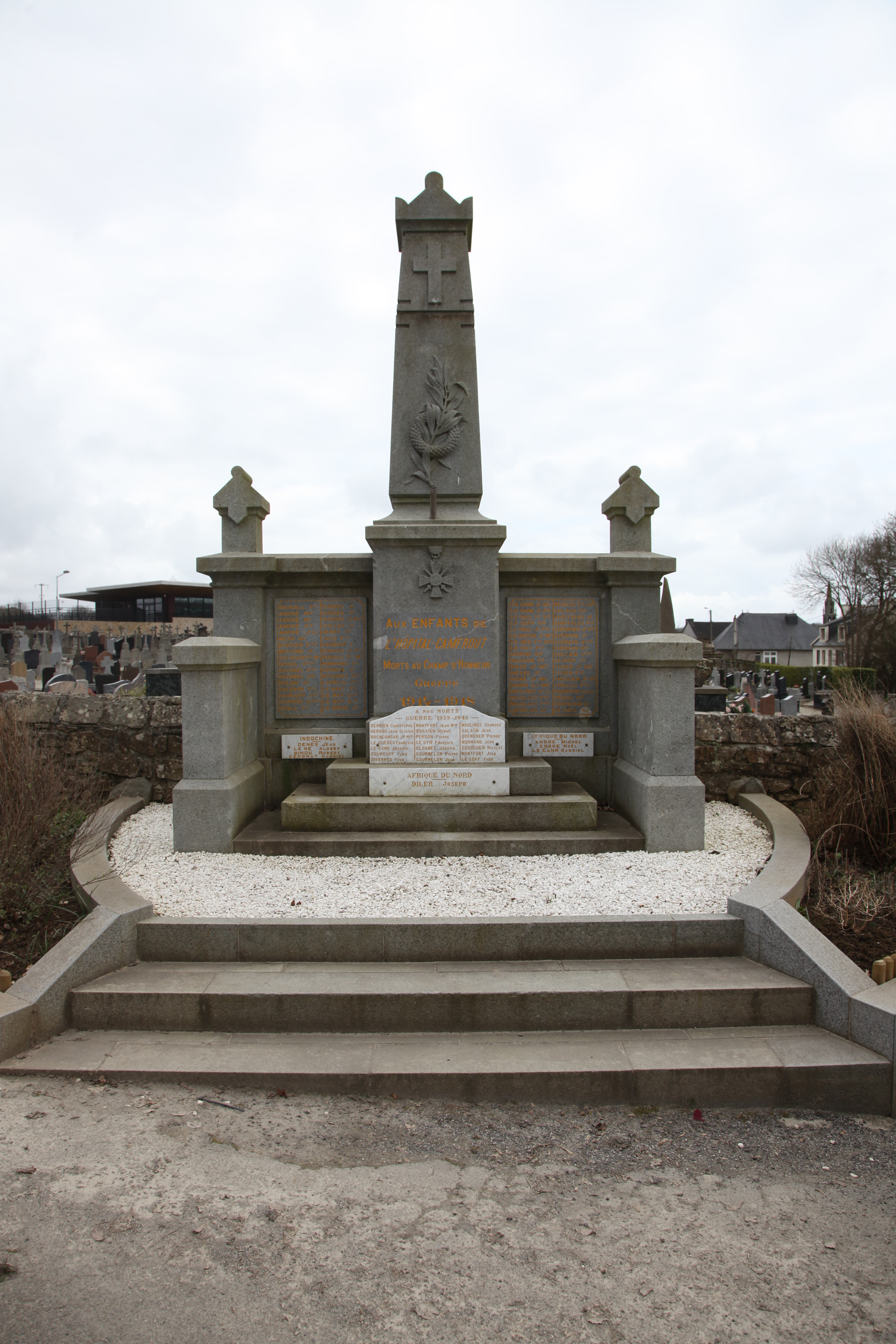 Monument aux morts de l'Hôpital-Camfrout